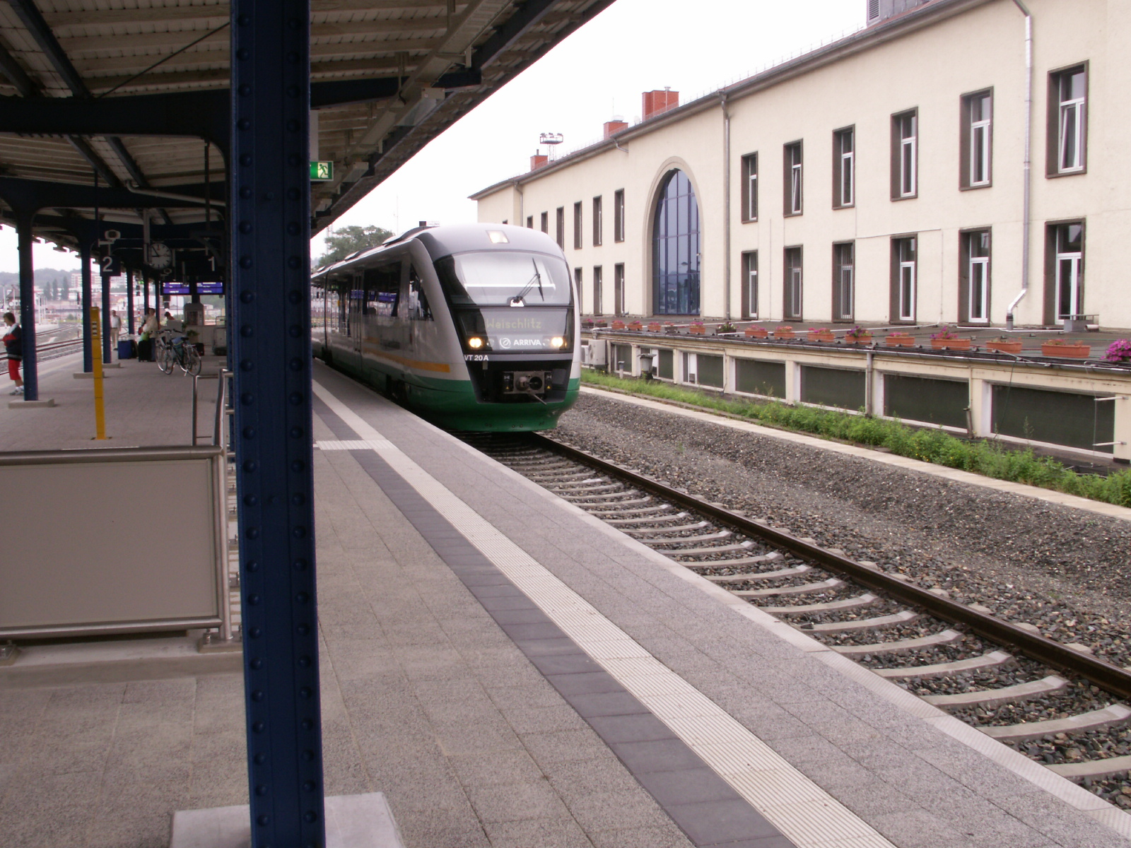 Gera Hbf